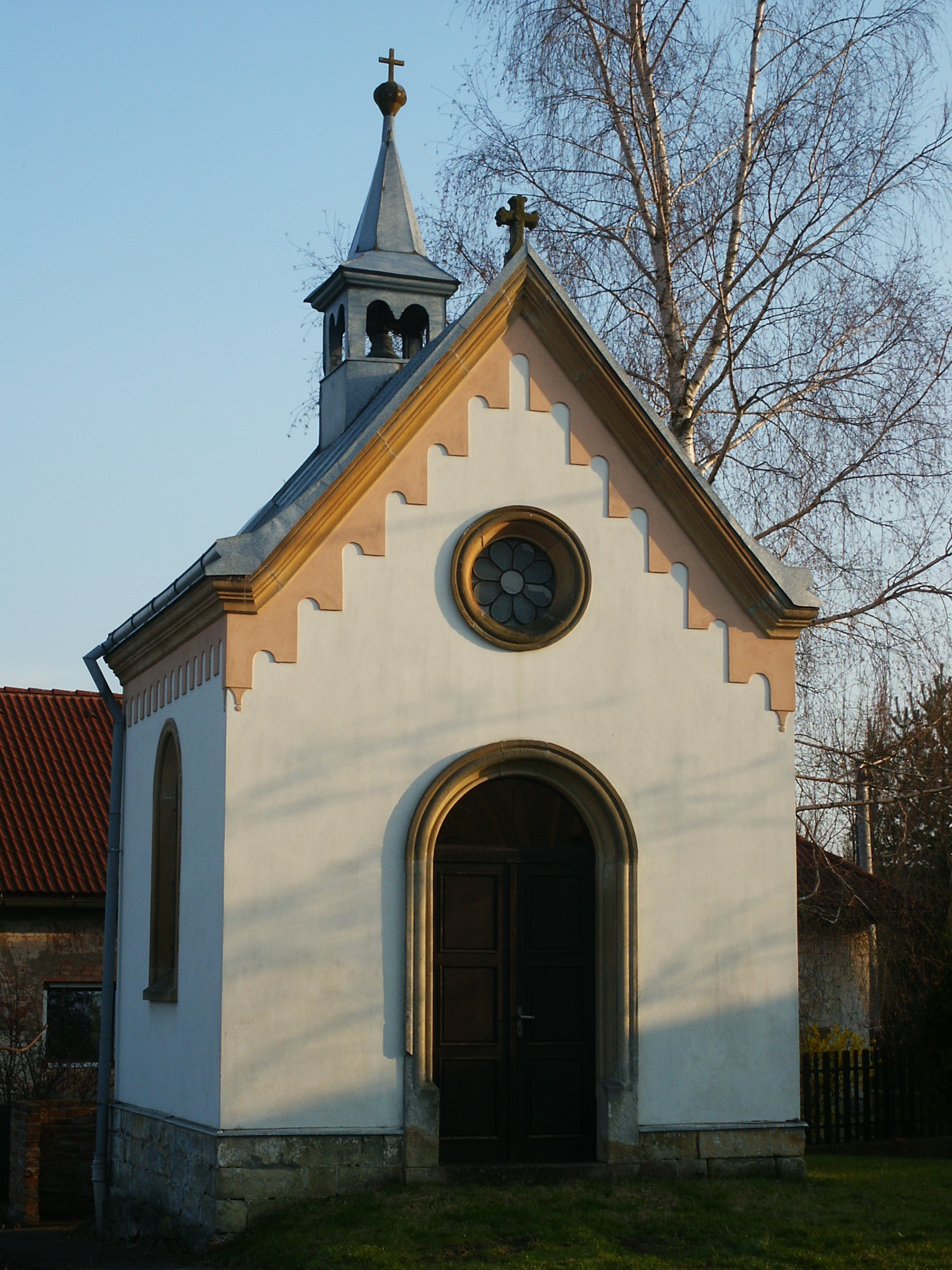 Čejkovice - kaplička